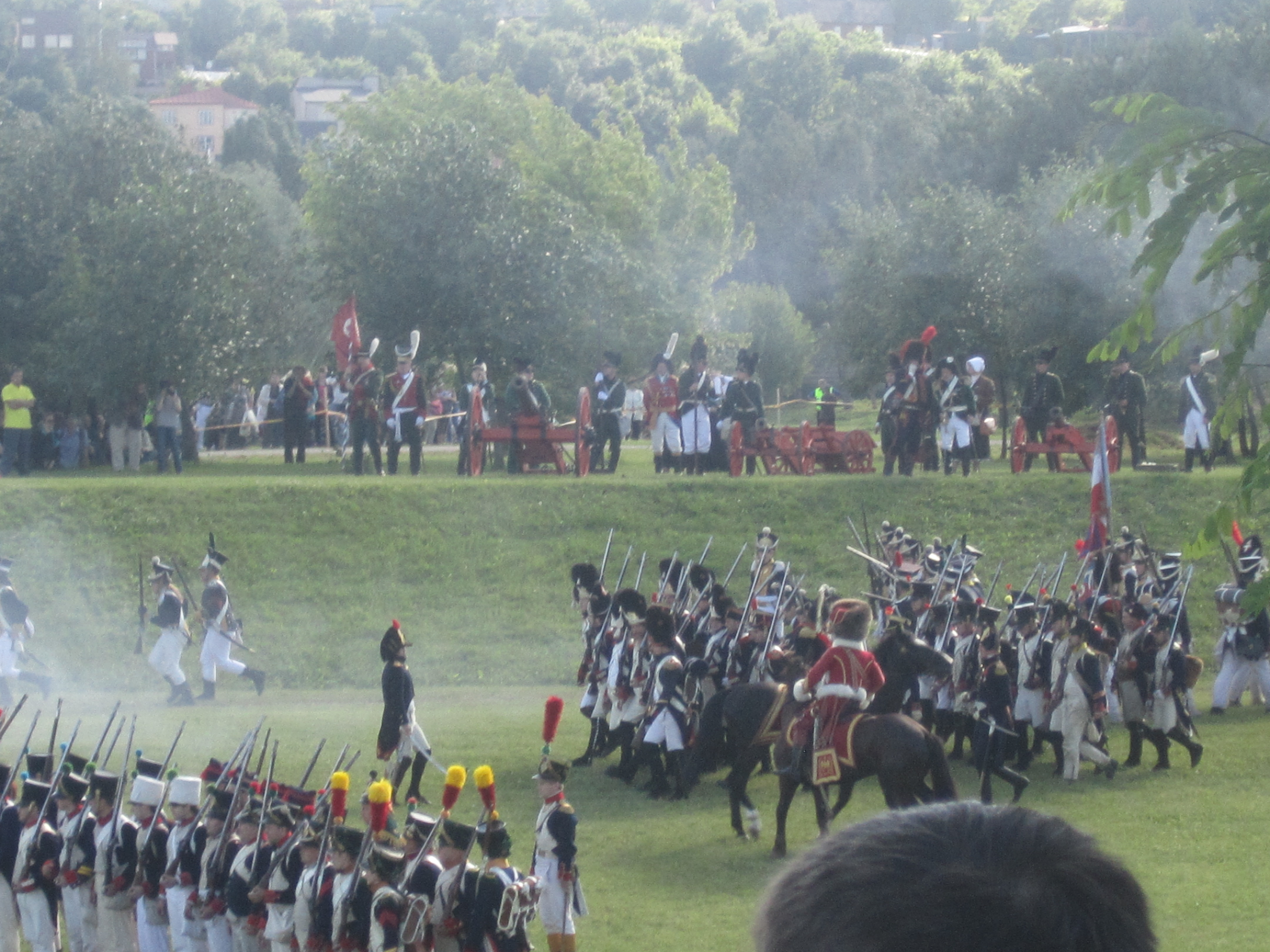 Napaleono mūšio atkūrimas